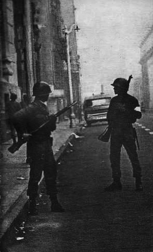 Portada del libro "Testimonios Chile Septiembre 1973. Prólogo de Ernesto Sábato" Ediciones de CRISIS, 1974. Argentina.